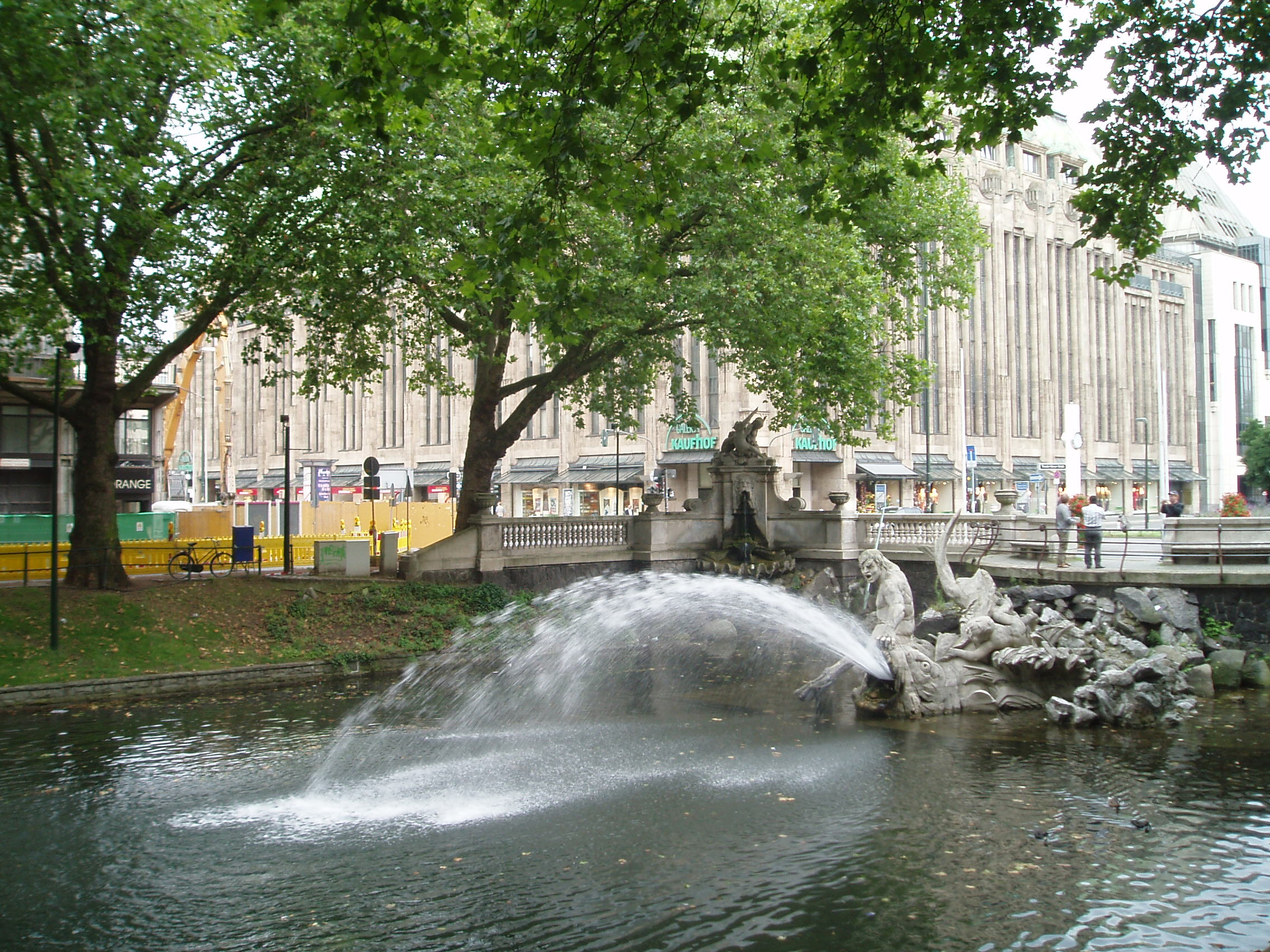 The Königsallee in Düsseldorf. Picture taken in August 2005 by Danielsp